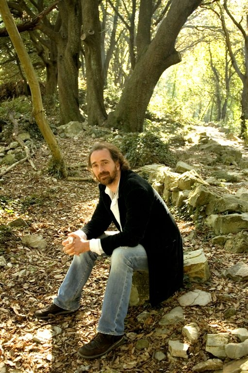 L'auteur-compositeur français Alan Simon en 2006.